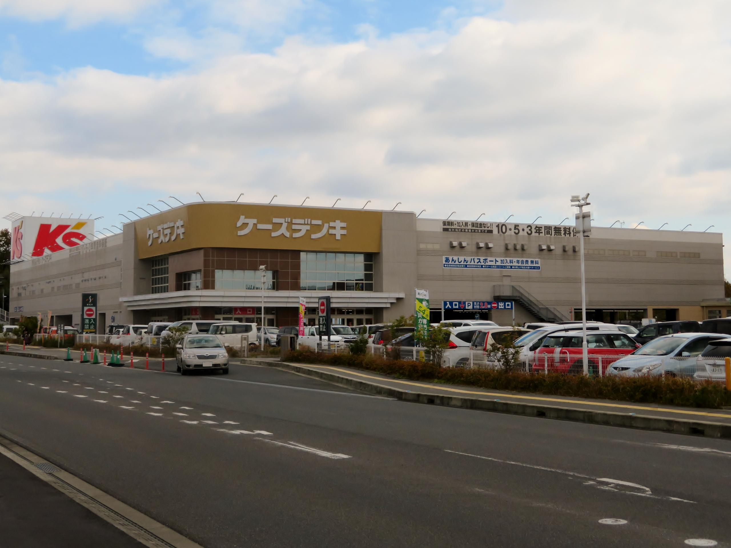 ケーズデンキ西大和店を撮影。